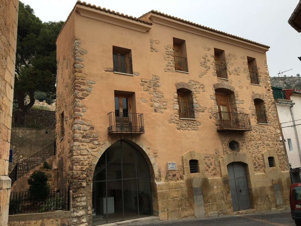 Museo de Borriol